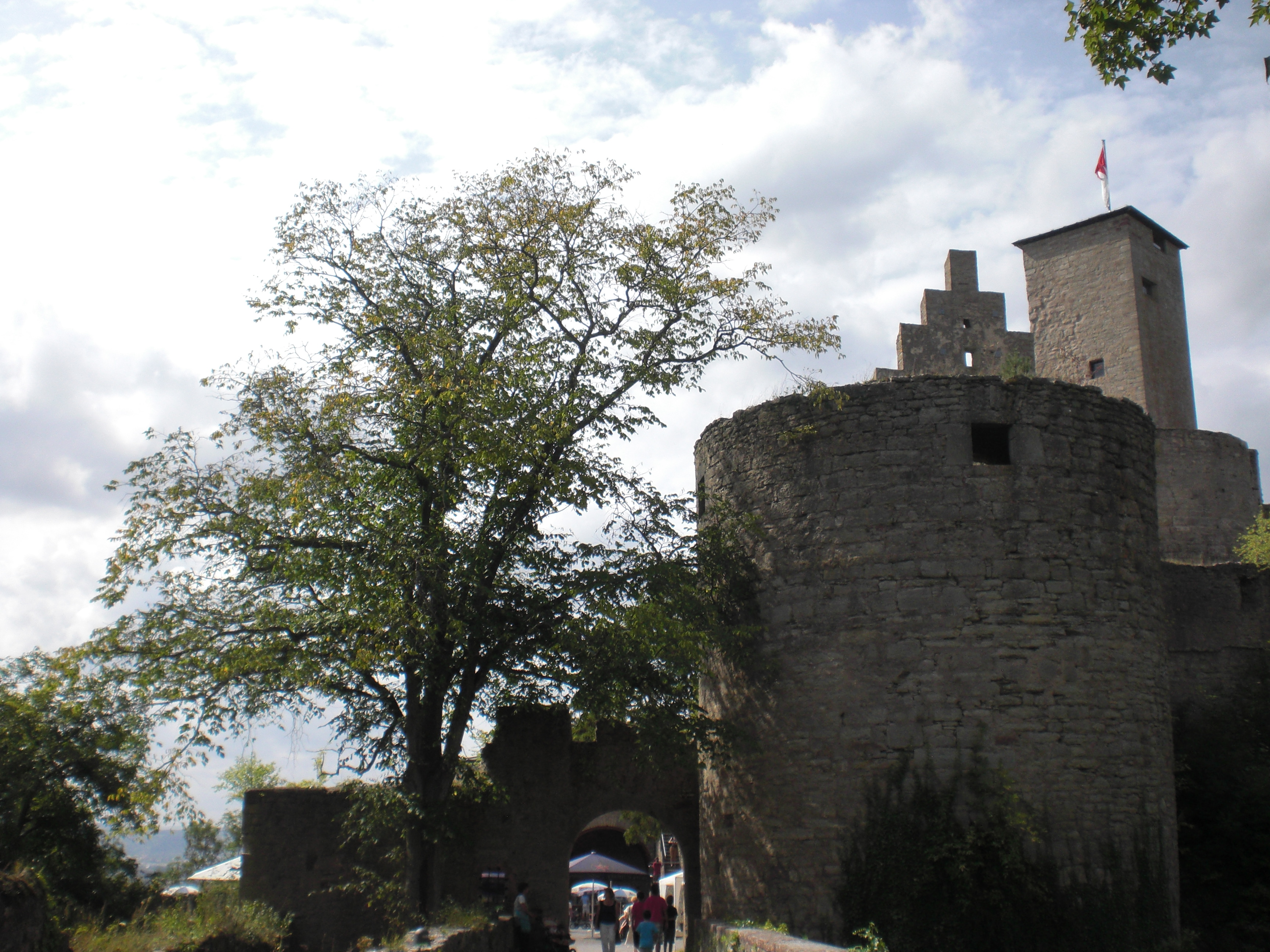 Außenansicht der Trimburg